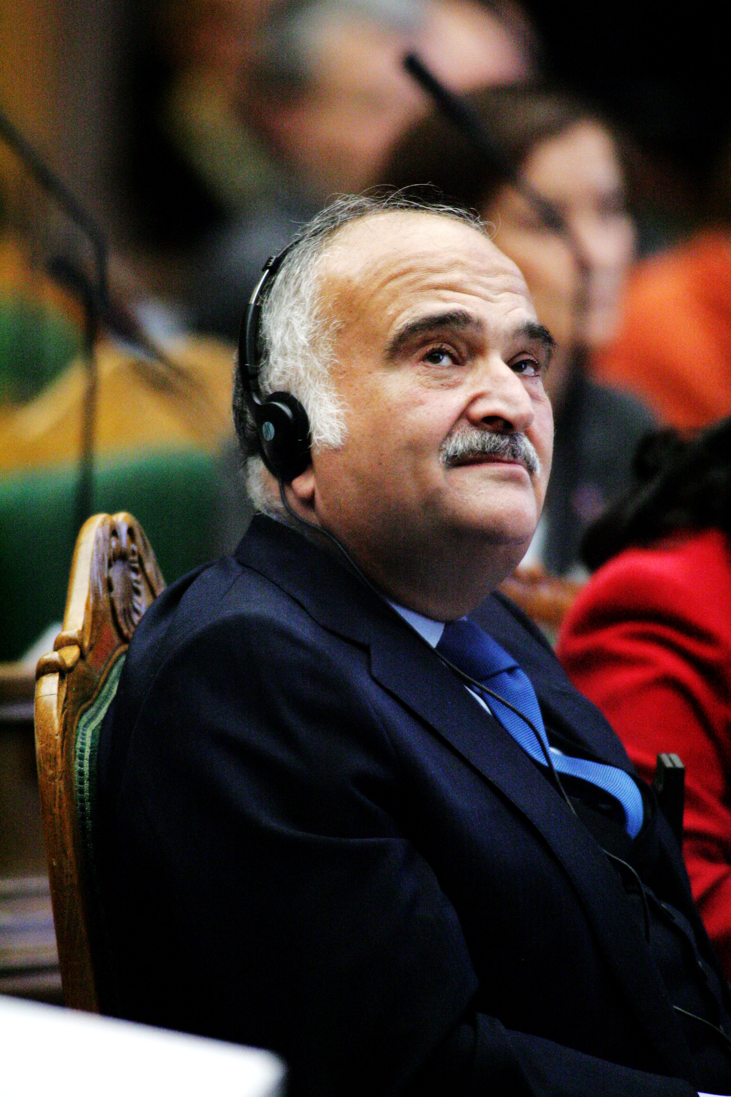 Hans Kongelige Højhed Prins Hassan af Jordan under Nordiska rådets session i Köpenhamn 2006.